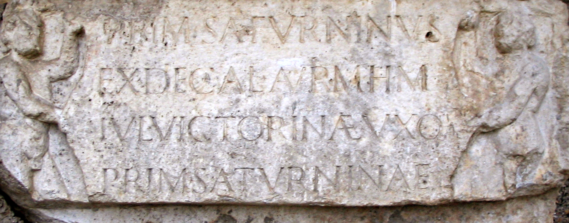 Sebastiankapelle Pförring, Landkreis Eichstätt, Oberbayern: Grabinschrift des Rittmeisters Primus Saturninus und dessen Frau Julia Victorina. 1903 beim Umbau der Pfarrkirche gefunden. Heute an der Sebastianskapelle angebracht. Literatur: Vollmer, Inscriptiones Baivariae Romanae 264 = CSIR Deutschland I,1 Nr. 508